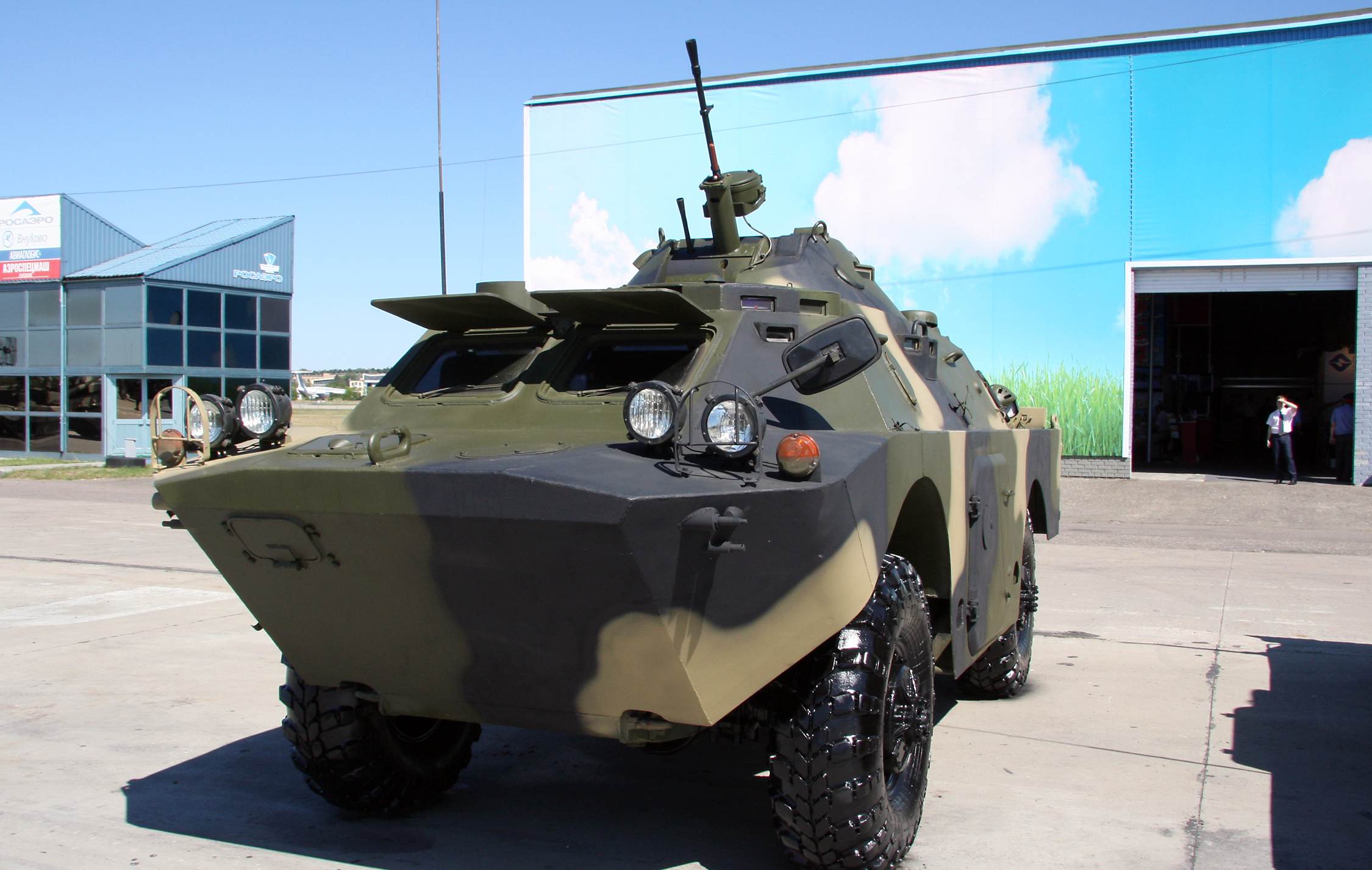 БРДМ-2